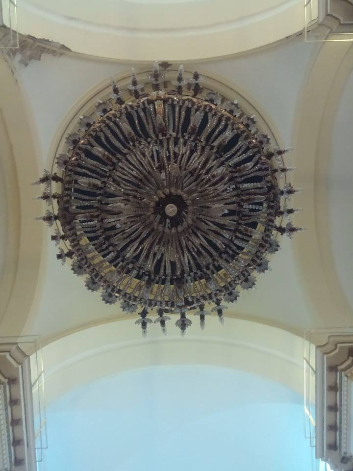 Una araña de mas de 100 años traída de París